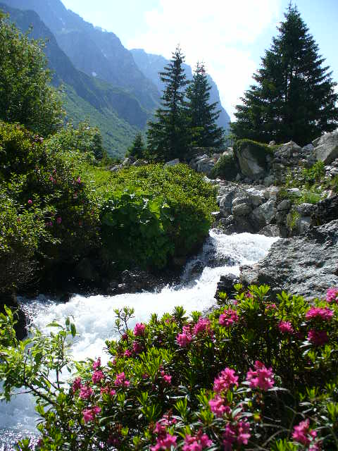 La combe du Merlet, située sur la commune de St Alban des Villards, est traversée par le torrent du même nom, aux eaux tumultueuses où viennent se désaltérer les ovins et les animaux sauvages. Bel itinéraire de randonnées pédestres